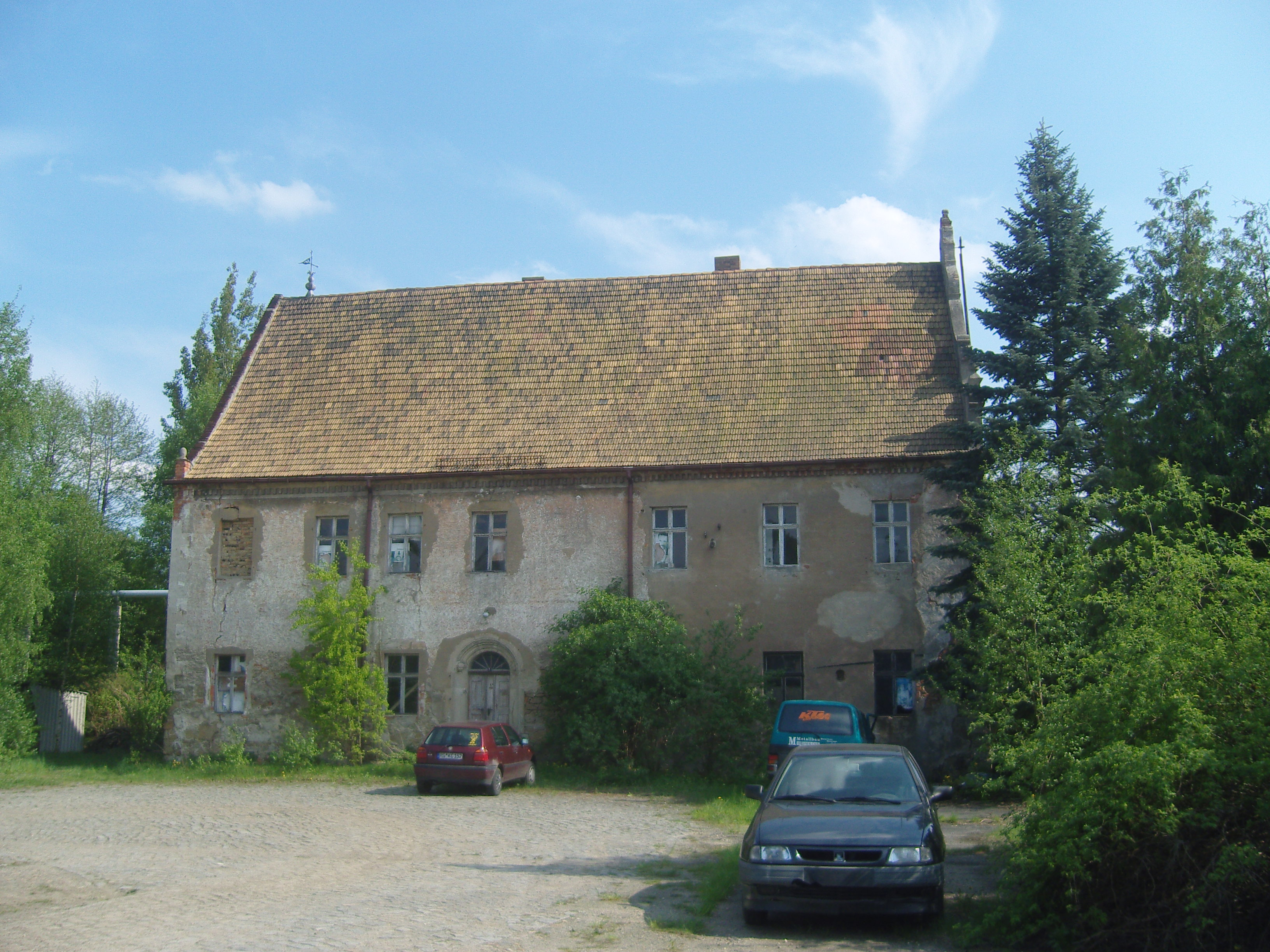 Lehnsmühlenschloß in Ortrand, Baudenkmal